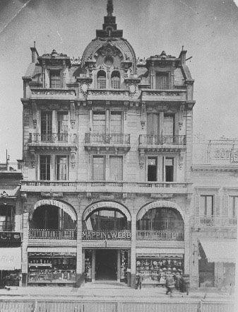 Edificio de la Casa Mappin & Webb, sucursal de la ciudad de Buenos Aires, Argentina. Calle Florida nº 28/36